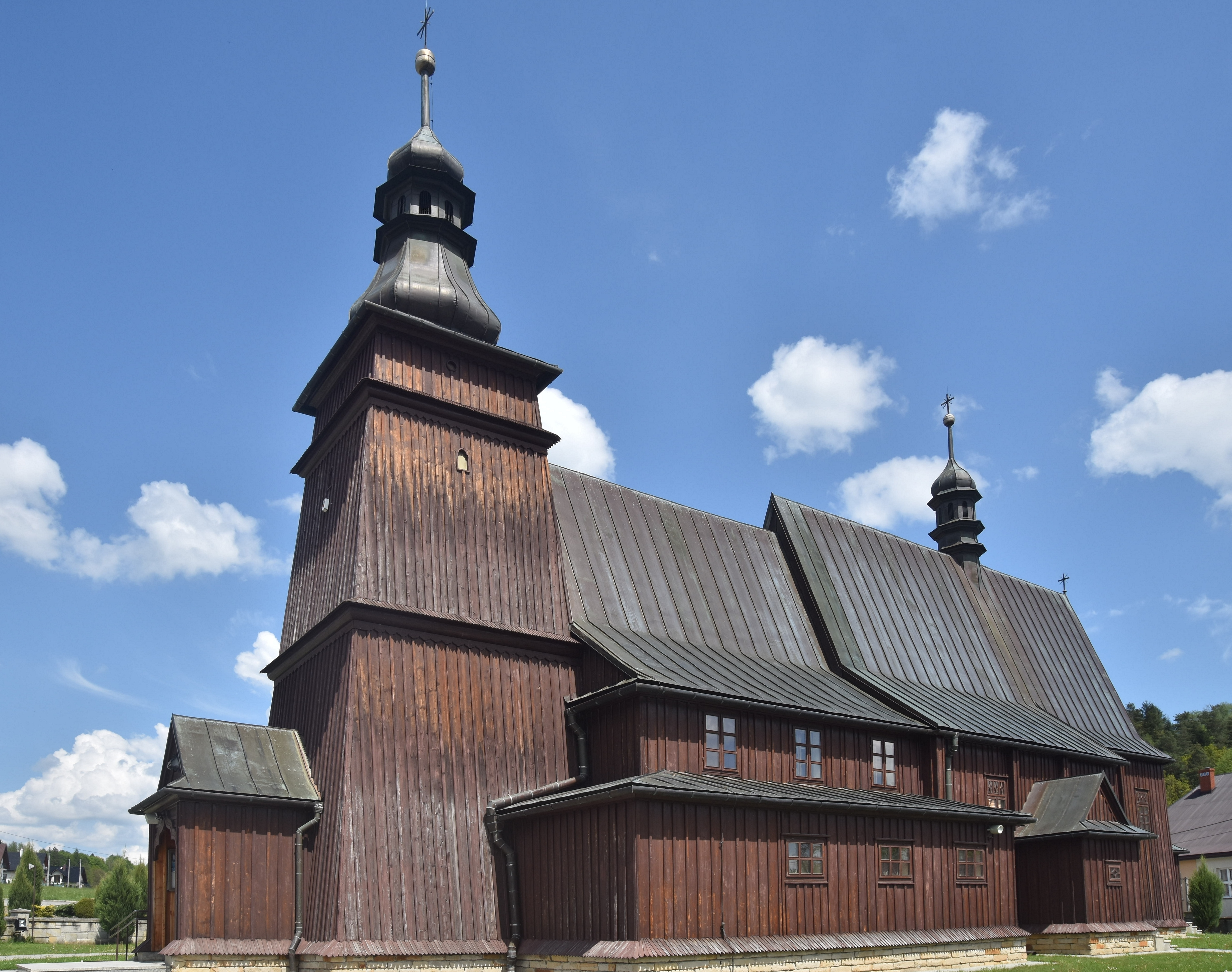 Jastrzębia, Kościół parafialny św. Bartłomieja